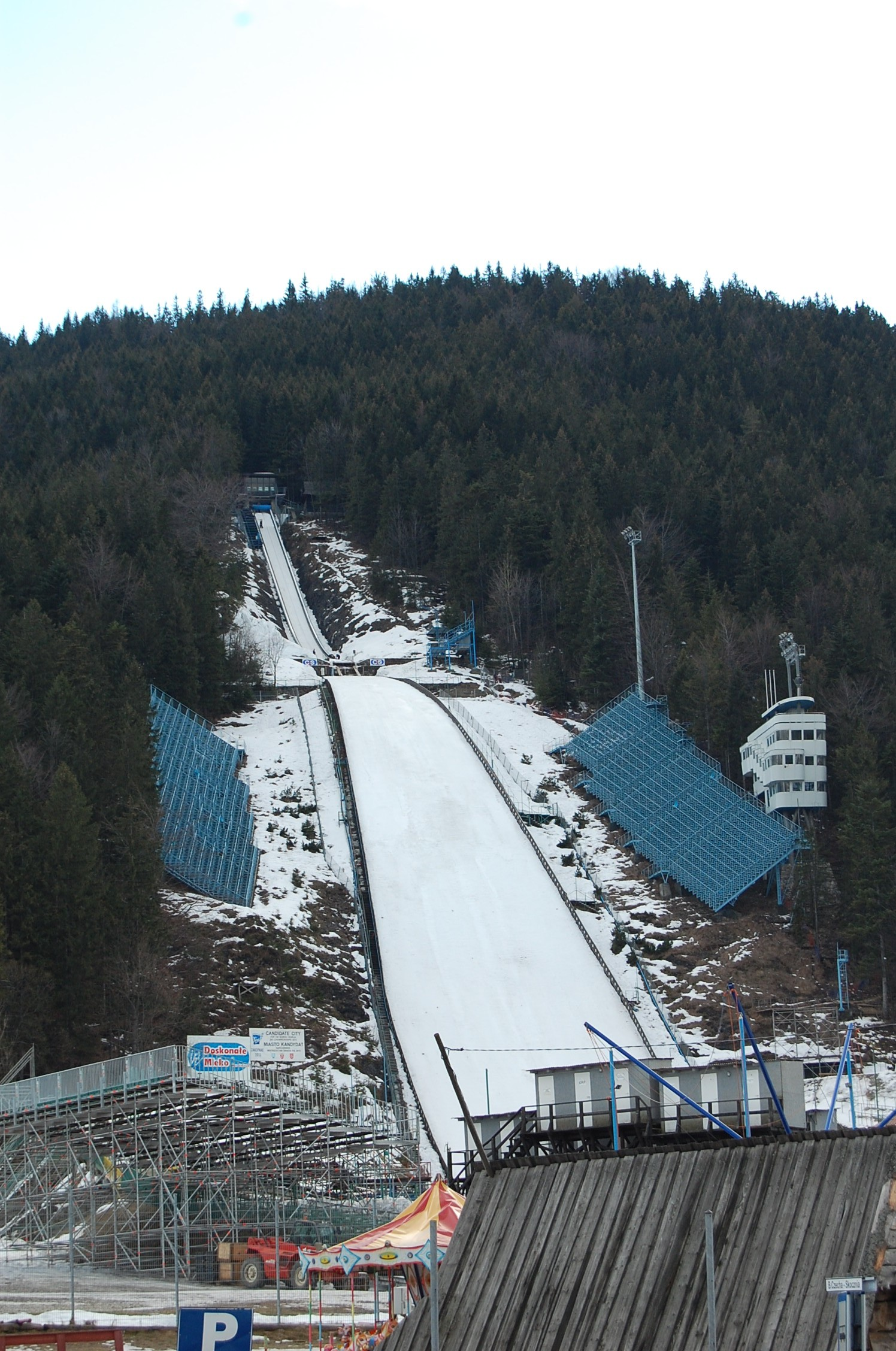 Wielka Krokiew Hill in Zakopane